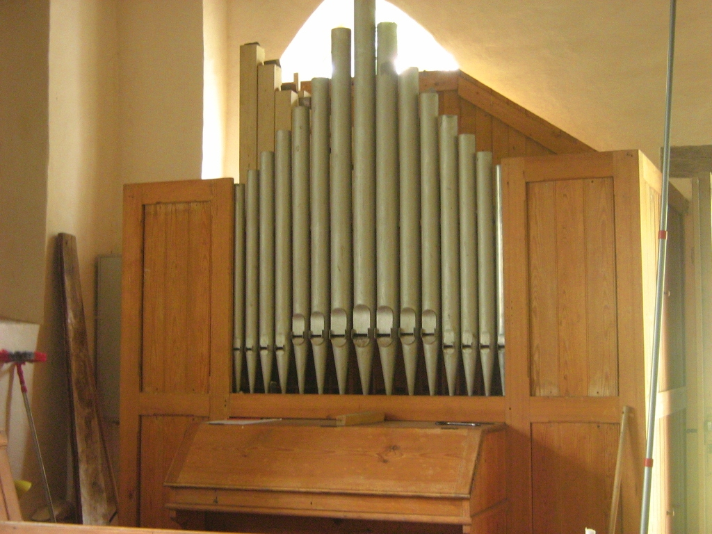 Orgel von Christian Börger in der Dorfkirche Rostocker Wulfshagen.